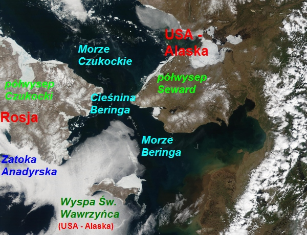 Zdjęcie satelitarne. Opis własny --Julo 00:50, 11 mar 2005 (CET)]